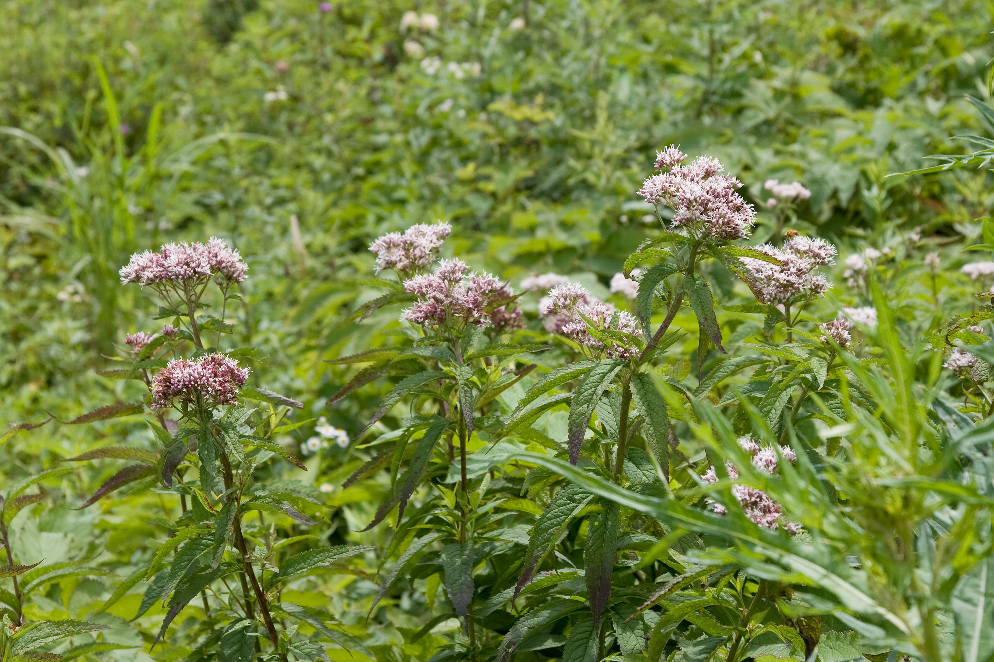 ヨツバヒヨドリ (学名:Eupatorium chinense var. sachalinense)